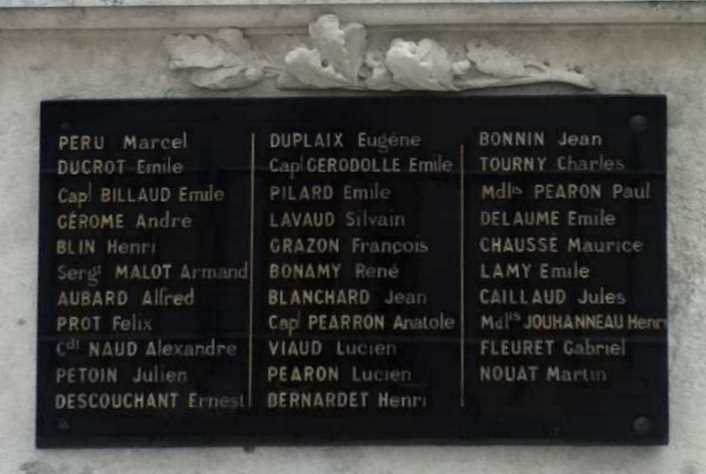 Monument aux Heroes de Saint Chartier. Plaque conmemorative.